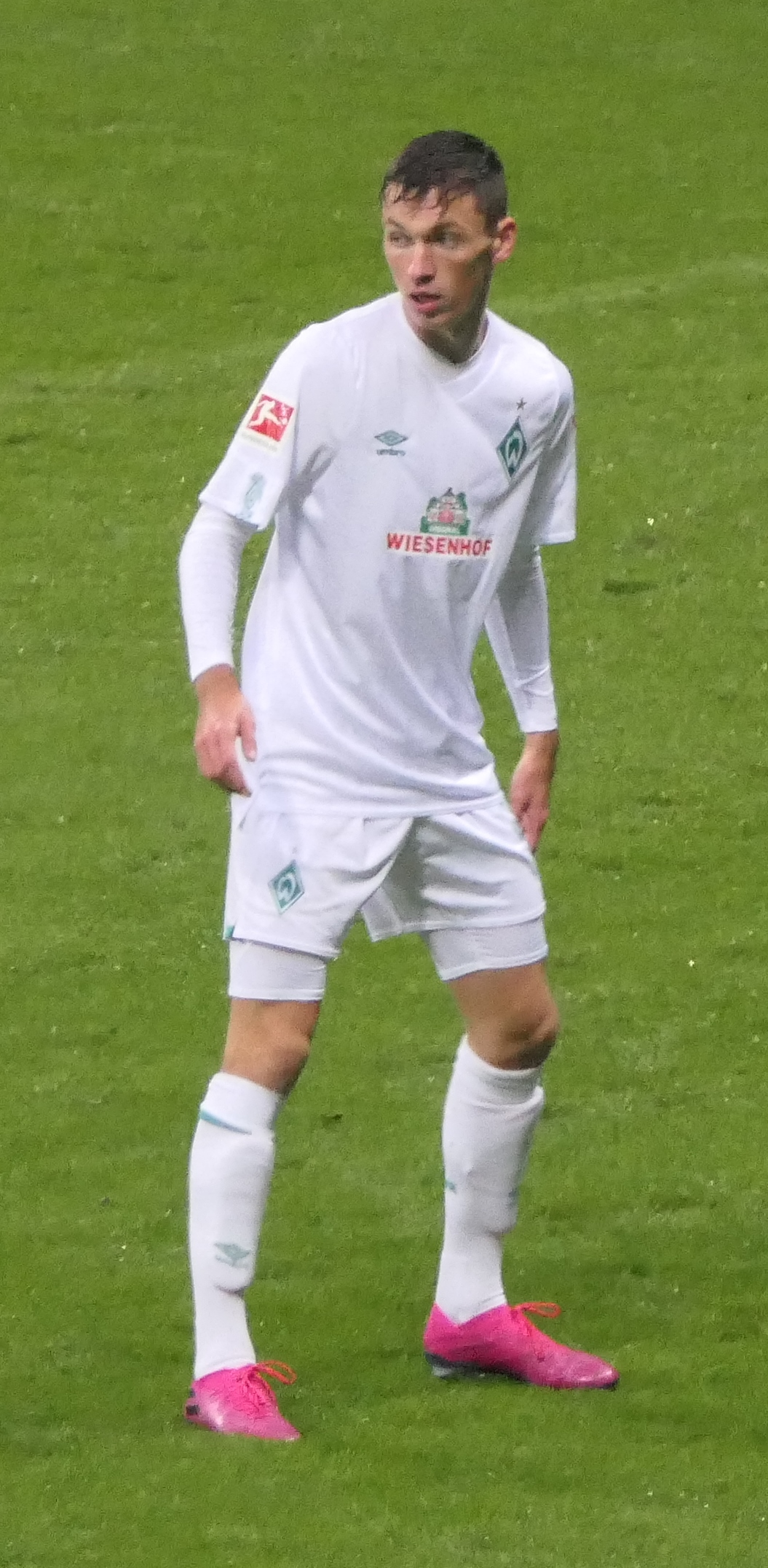 Der Fussballprofi Benjamin Goller im Trikot vom SV Werder Bremen beim Auswärtsspiel gegen Eintracht Frankfurt am 06.10.2019.